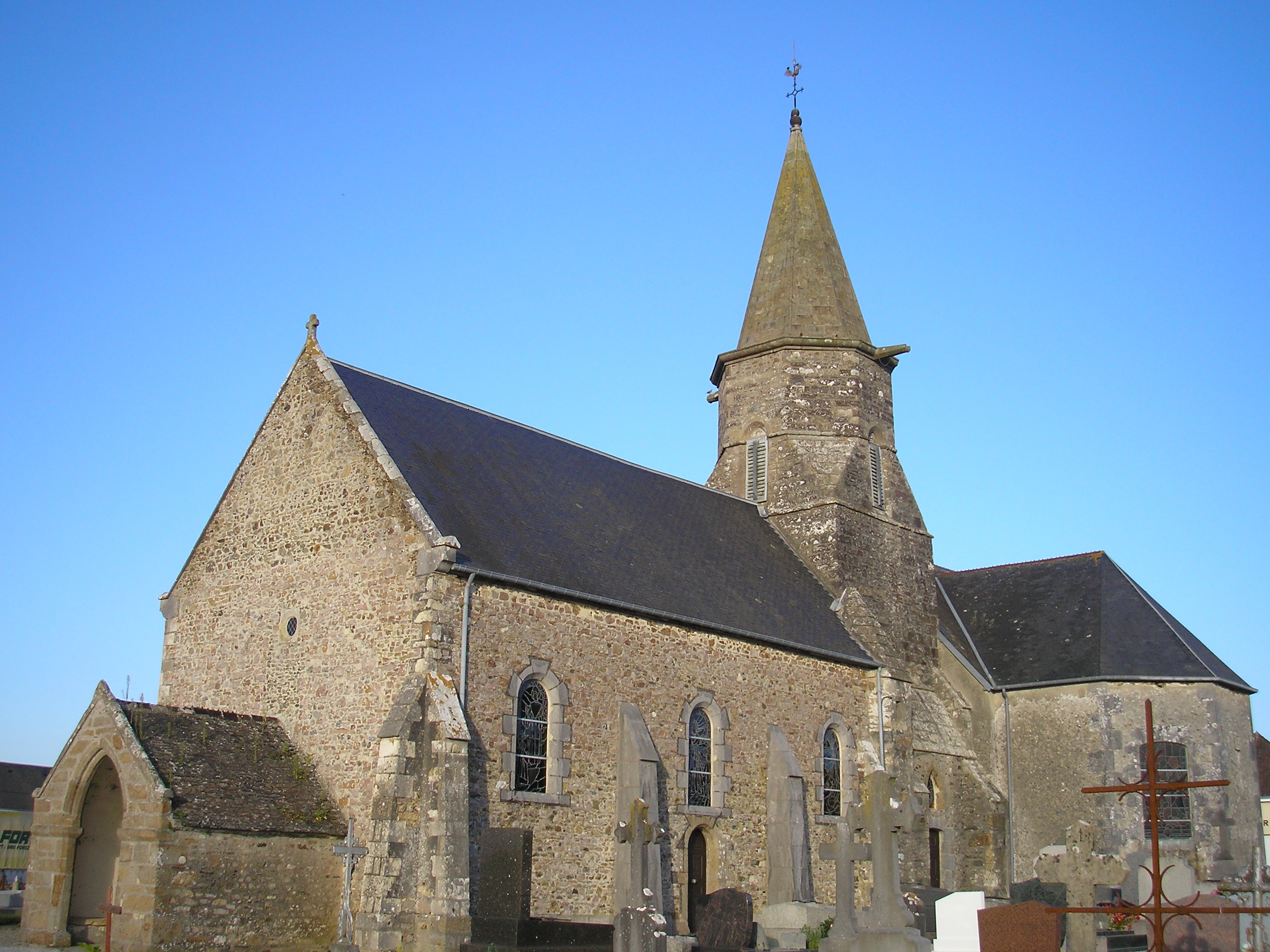 Montsurvent (Normandie, France). L'église Saint-Martin.